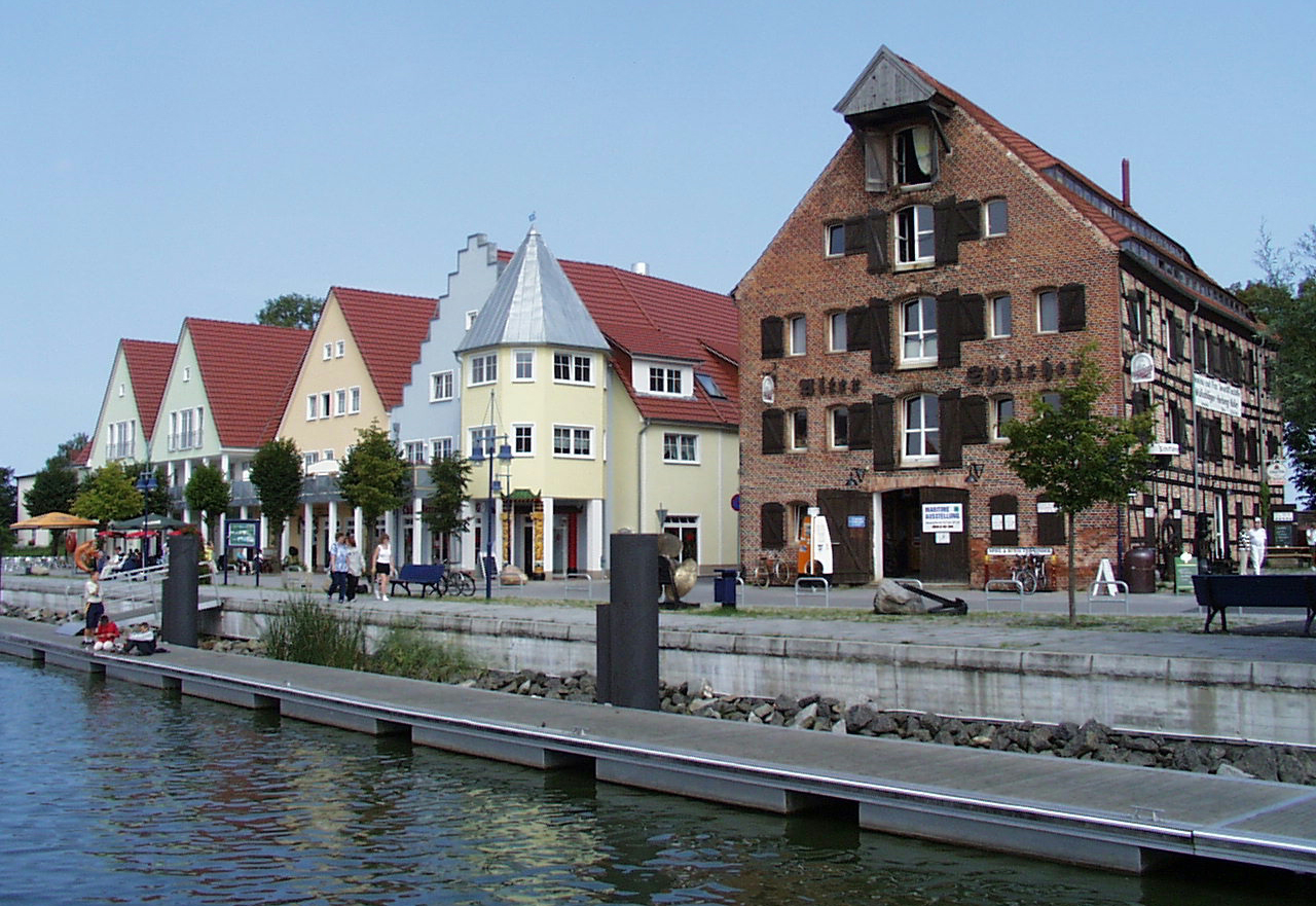 Der alte Speicher im Hafen